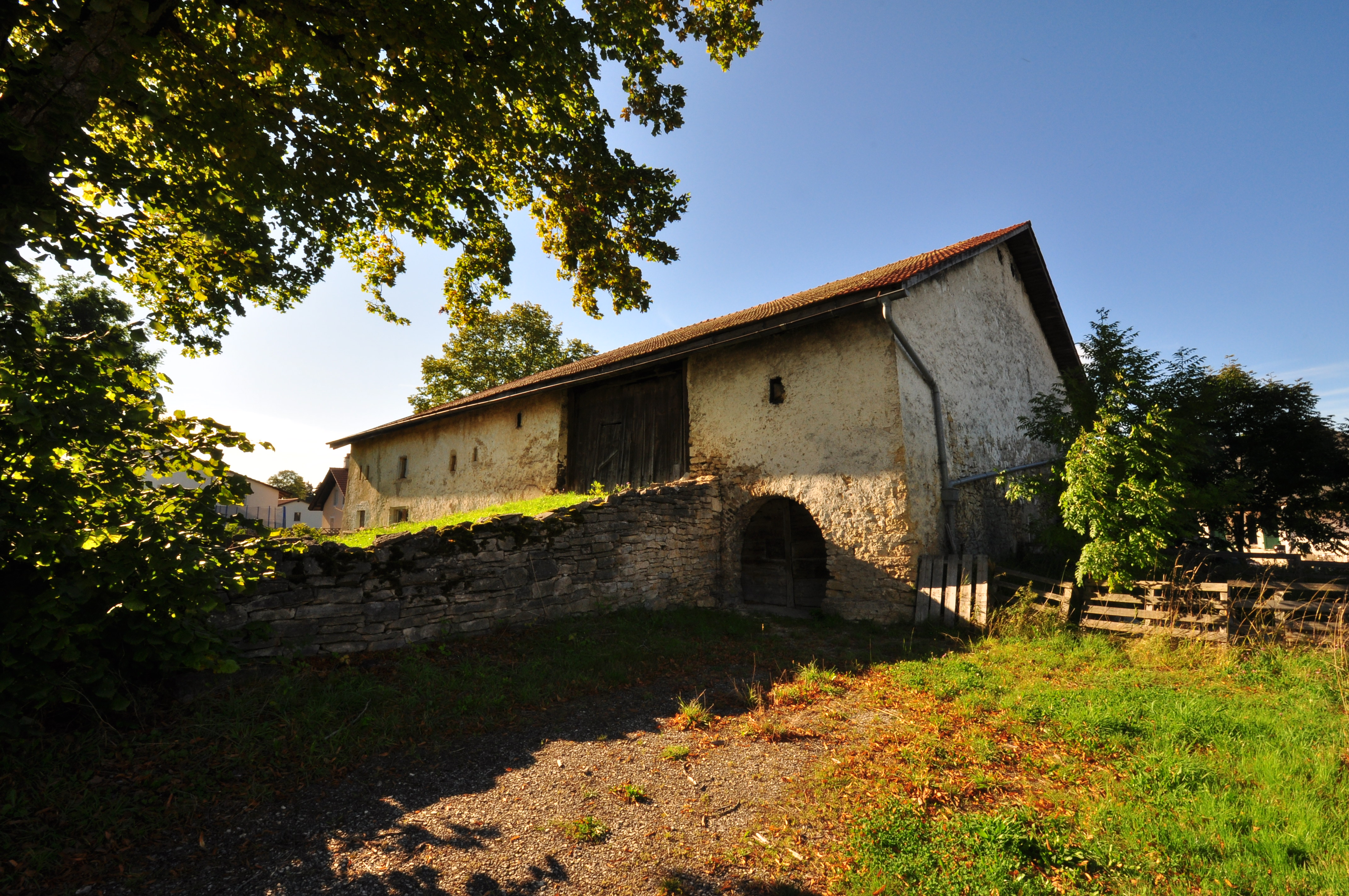 Les Genevez Ferme